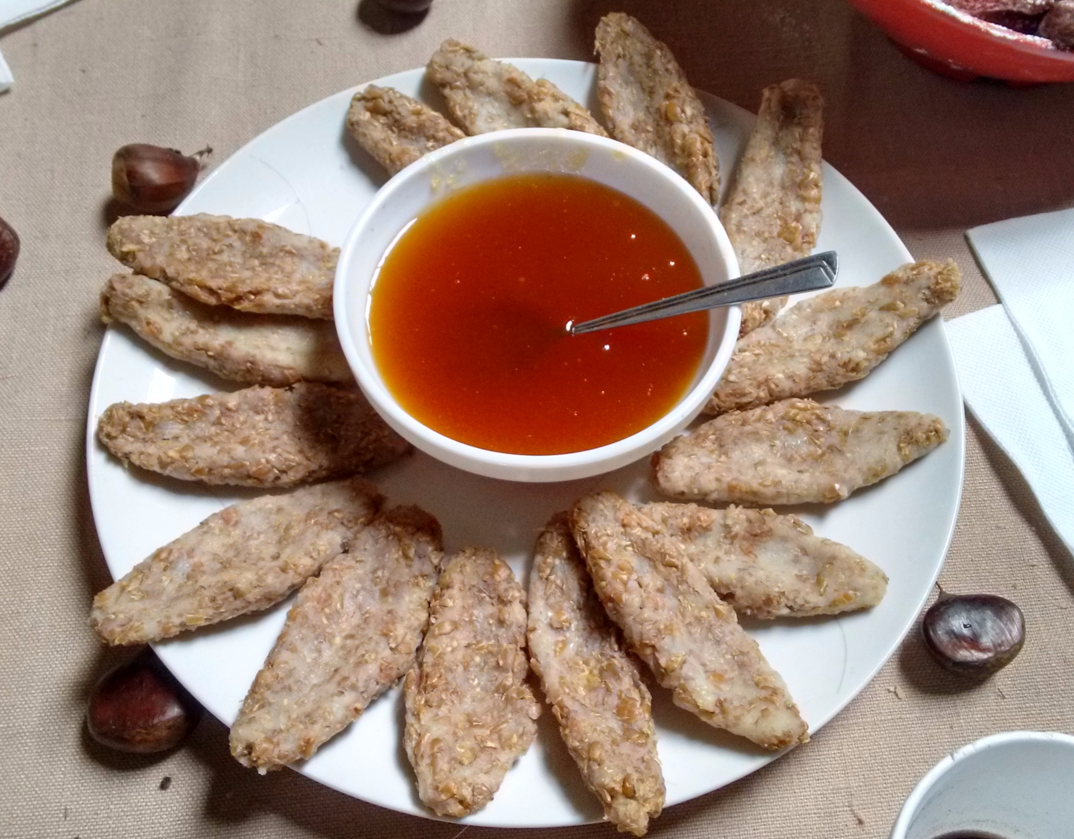 El catuto o mültrün es una preparación típica de la cultura mapuche. Es una masa en base a granos triturados de trigo cocido y pelado o trigo mote. Tiene una forma alargada y se consume frío con aderezos dulces como miel.